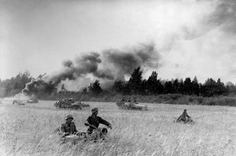 Ostfront, Gegenstoss der Division Großdeutschland Scherl Kradschützen und Panzerfüsiliere der Division "Großdeutschland" greifen in Deckung von Wäldern und Kornfeldern eingebrochene Sowjets im Gegenstoß an. PK-Aufnahme: Broenner 31.8.44 [Herausgabedatum] ADN-ZB- Archiv II.Weltkrieg 1939 - 45 Deutsch- sowjetische Front, Mitte August 1944: Kradschützen und Panzerfüsiliere der Division "Grossdeutschland" der faschistischen deutschen Wehrmacht im Einsatz (Aufnahme. Broenner)